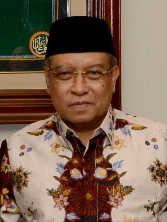 Ketua Umum Pengurus Besar Nahdlatul Ulama periode 2010-2020